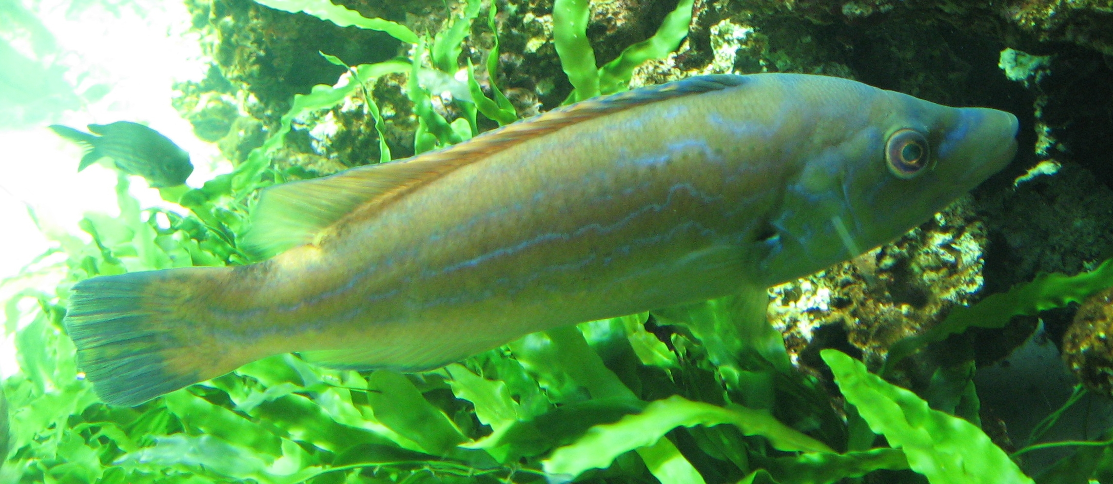 Labrus mixtus in Aquarium Cinéaqua Map: 48° 51' 44" N 2° 17' 27" E